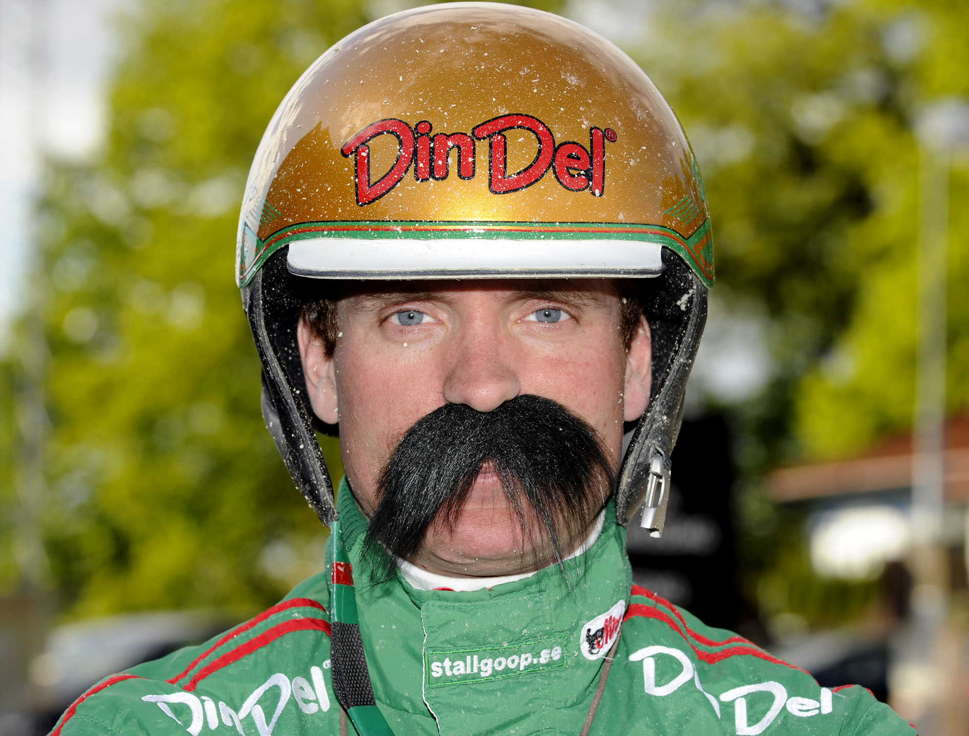 Travkusken Björn Goop i ett foto för Mustaschkampen, en kampanj som samlade in pengar till forskning, relaterad till prostatacancer.